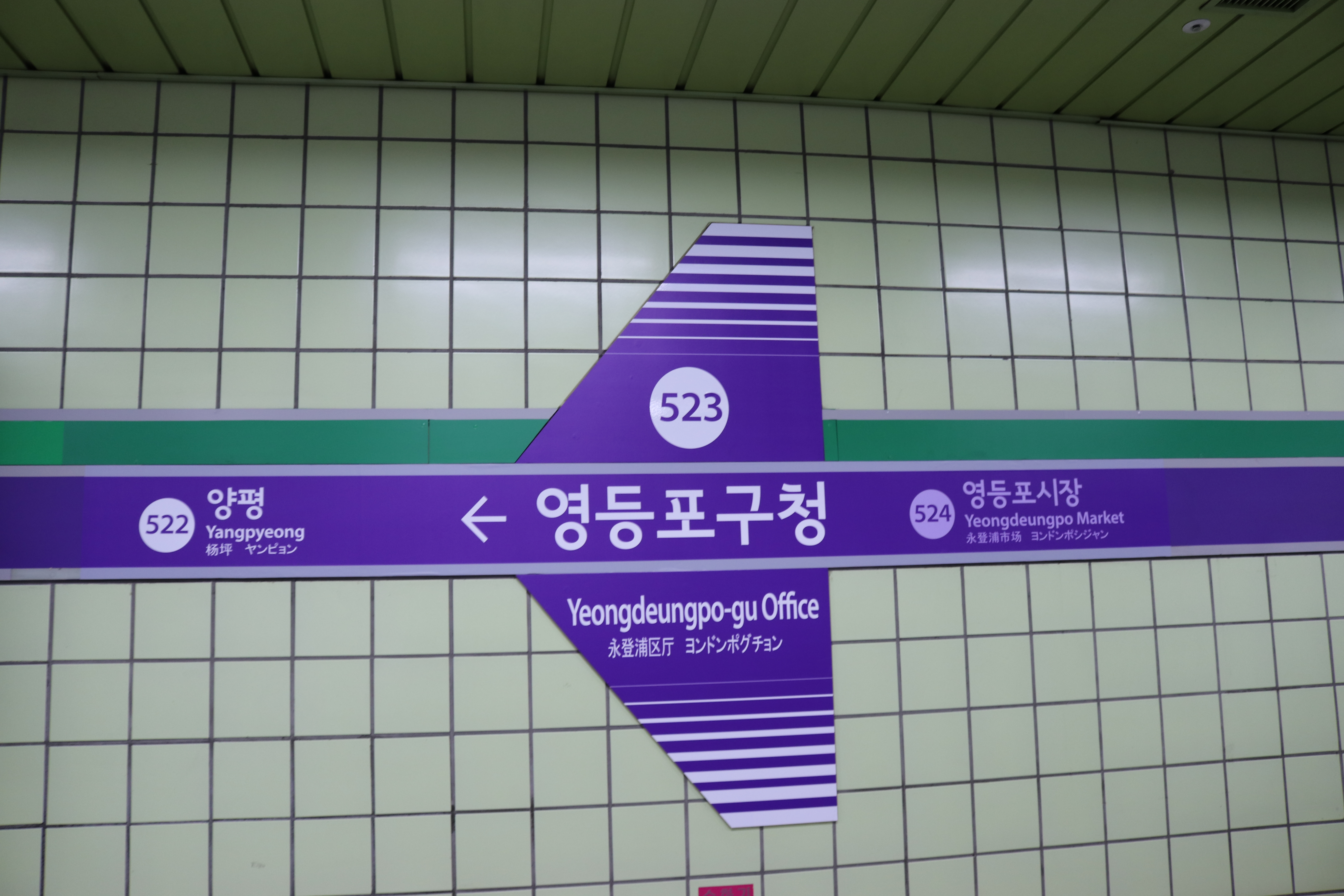 영등포구청역 5호선 역명판